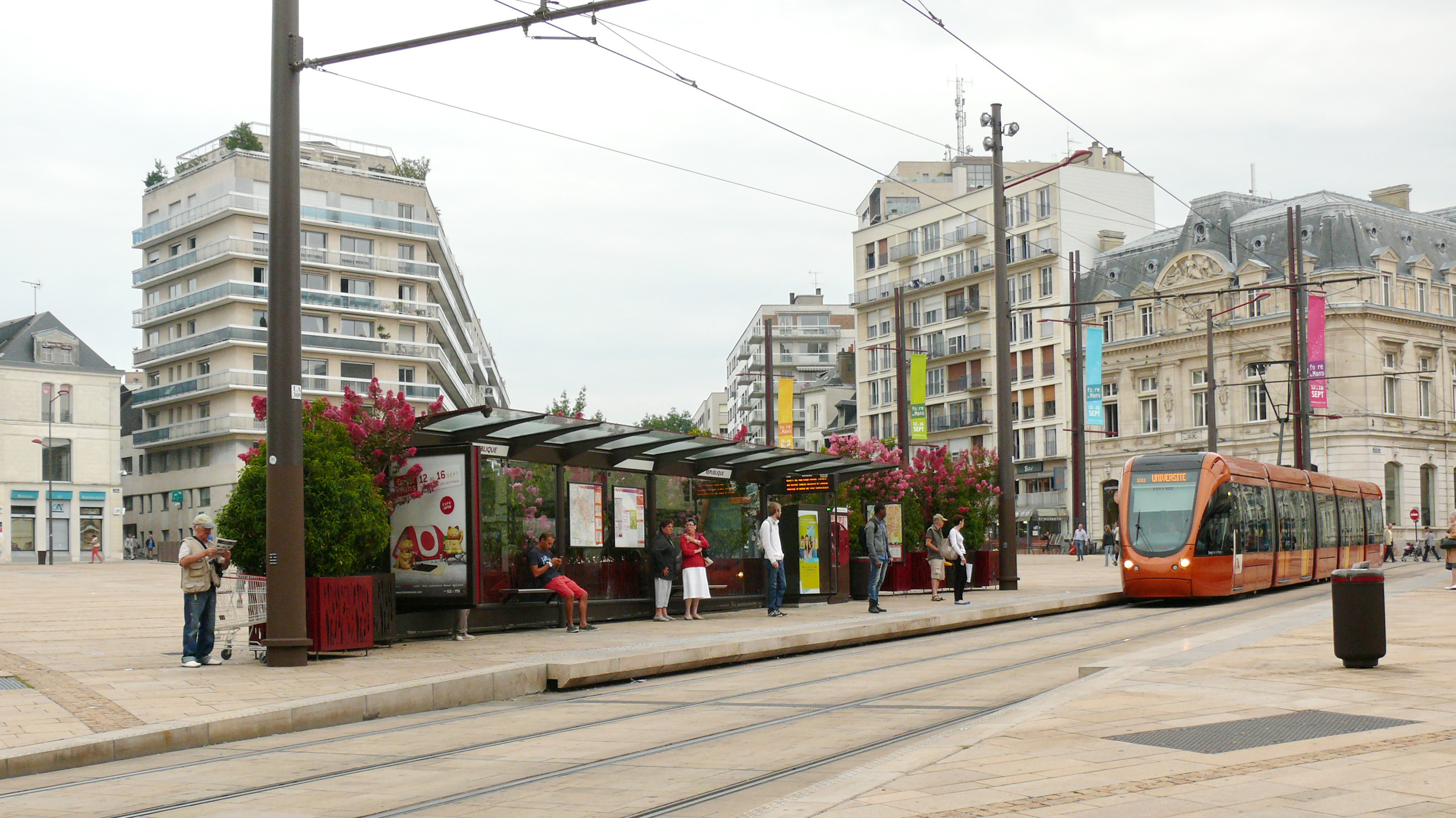 Tramway à l’approche de la station République au Mans